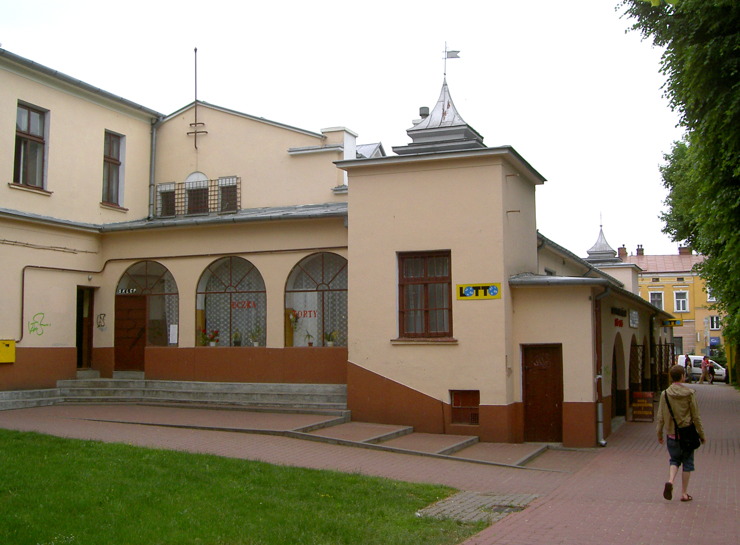 Radymno, Poland • Sukiennice / Gewandhaus